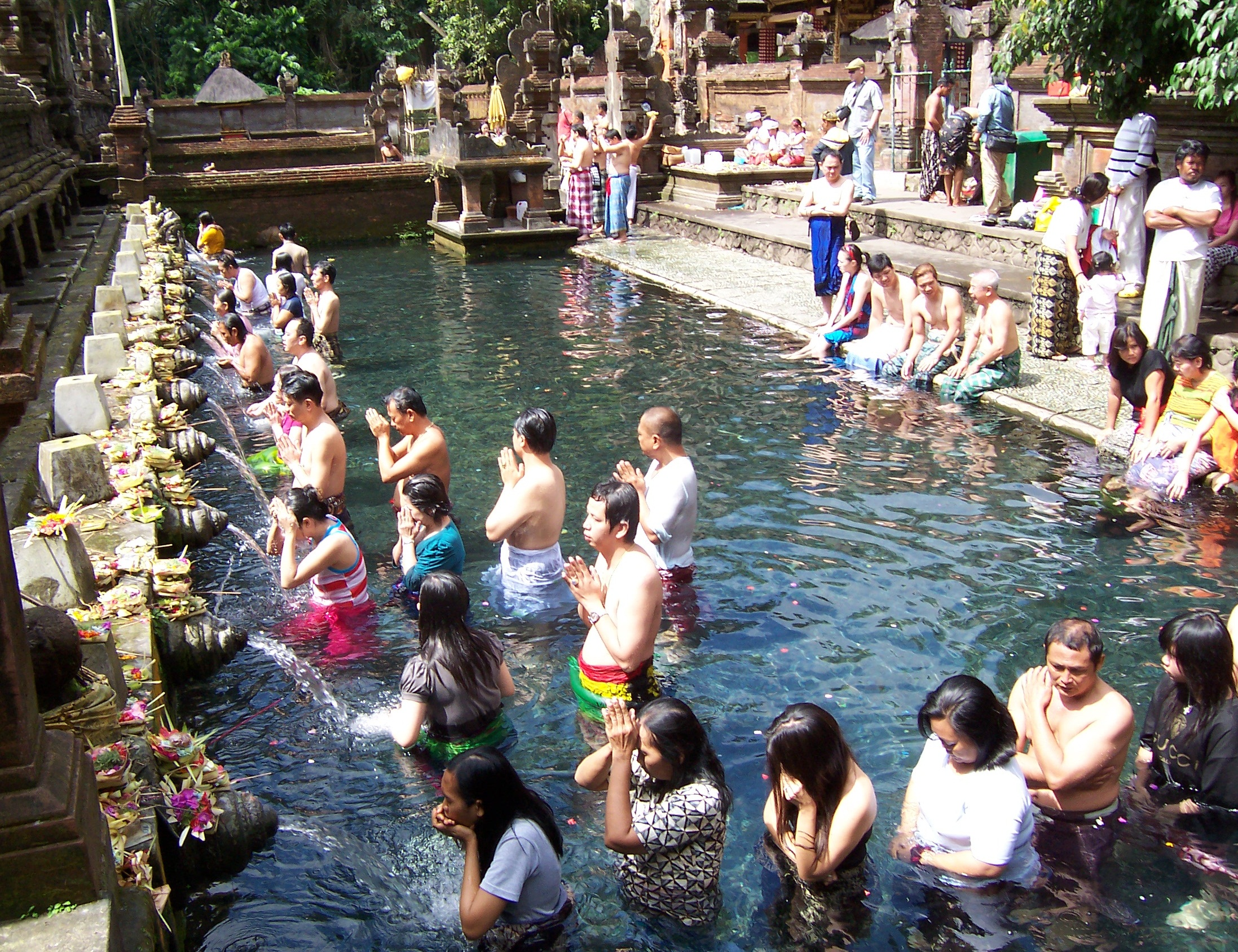 Омовение в святом источнике на Бали